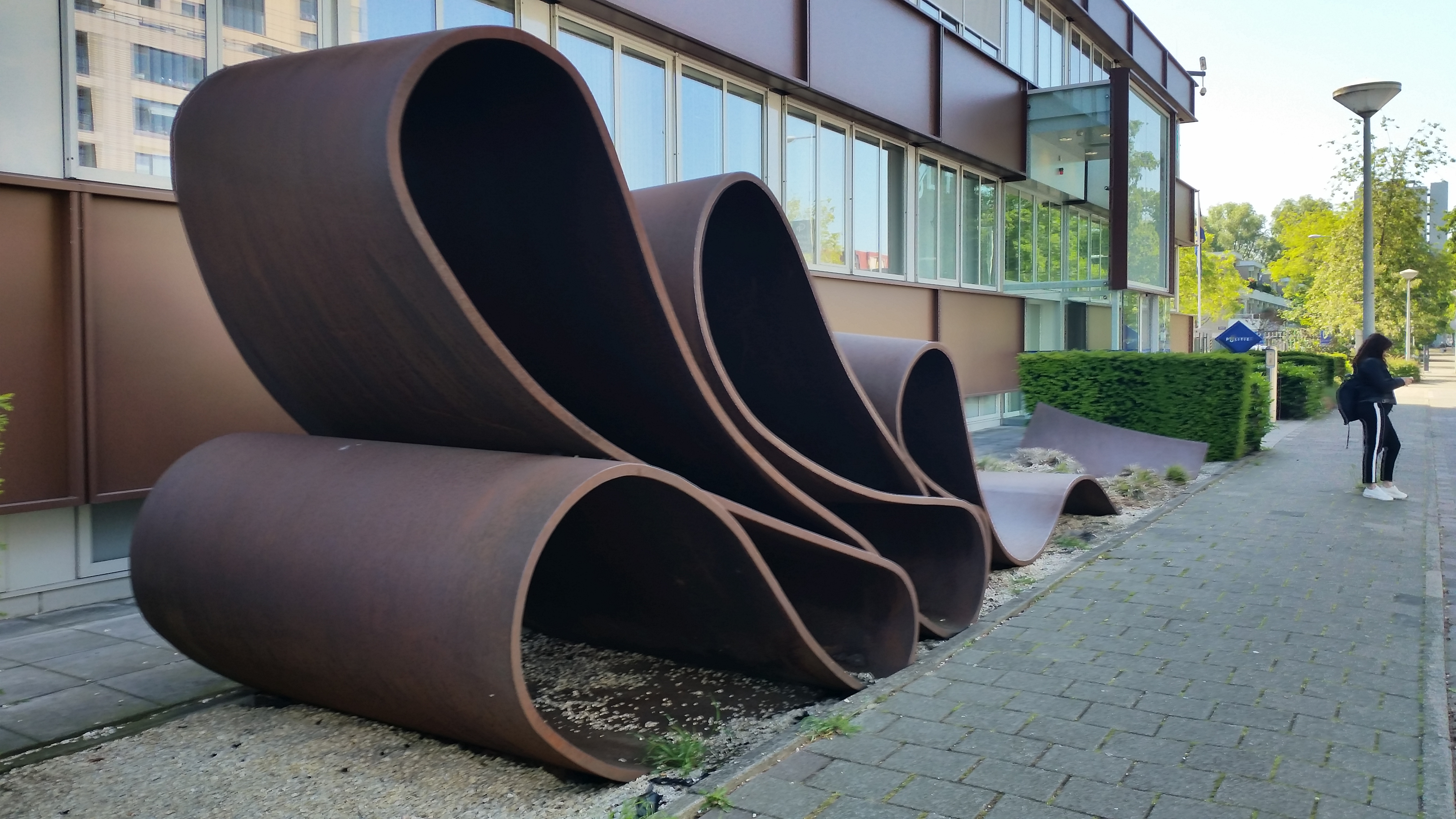 Golvende plaat (Walraeven), zijaanzicht